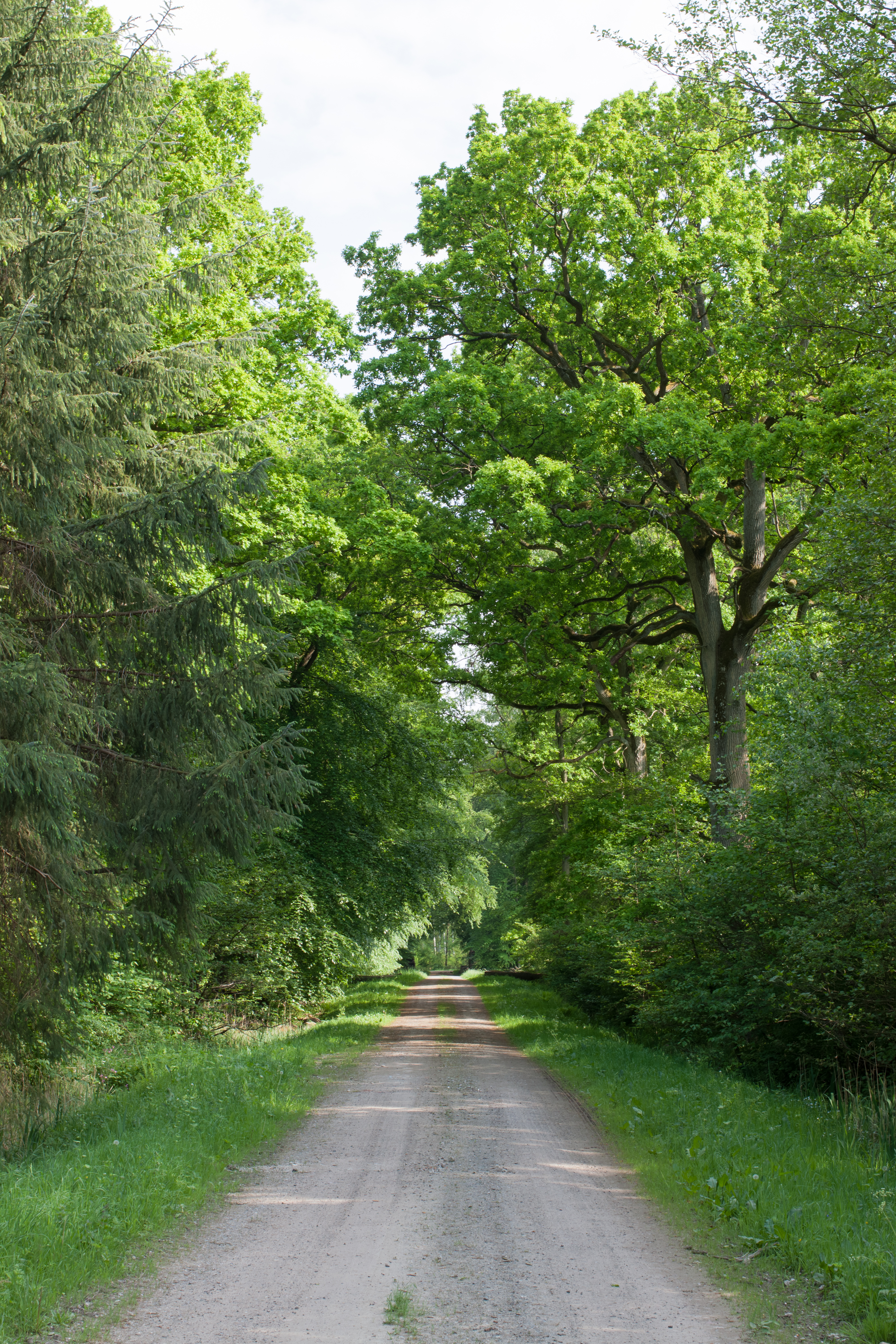 FFH-Gebiet Nummer 1946-301 im Kreis Vorpommern-Greifswald: Wälder um Greifswald